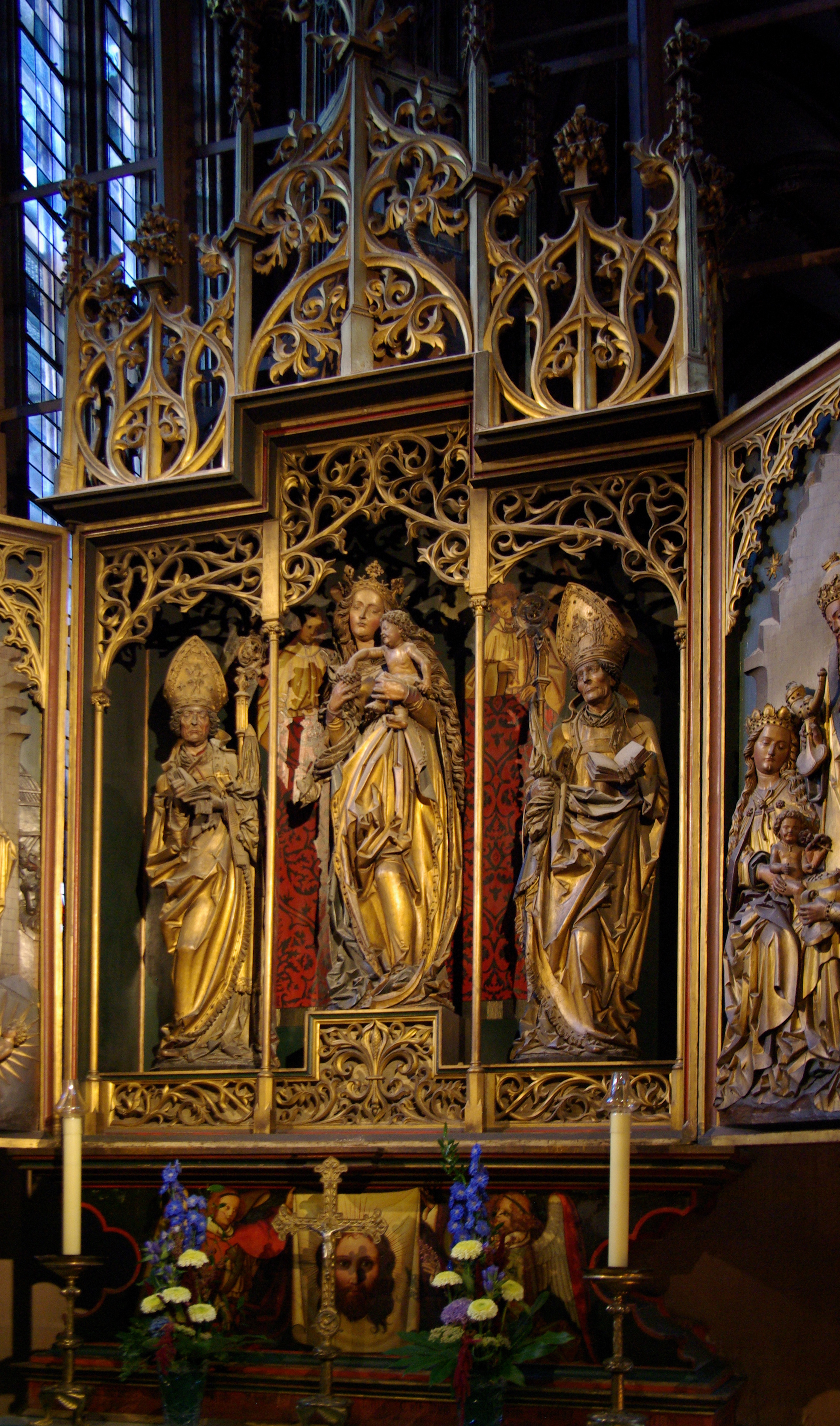 Mainz, Dom, Marienaltar